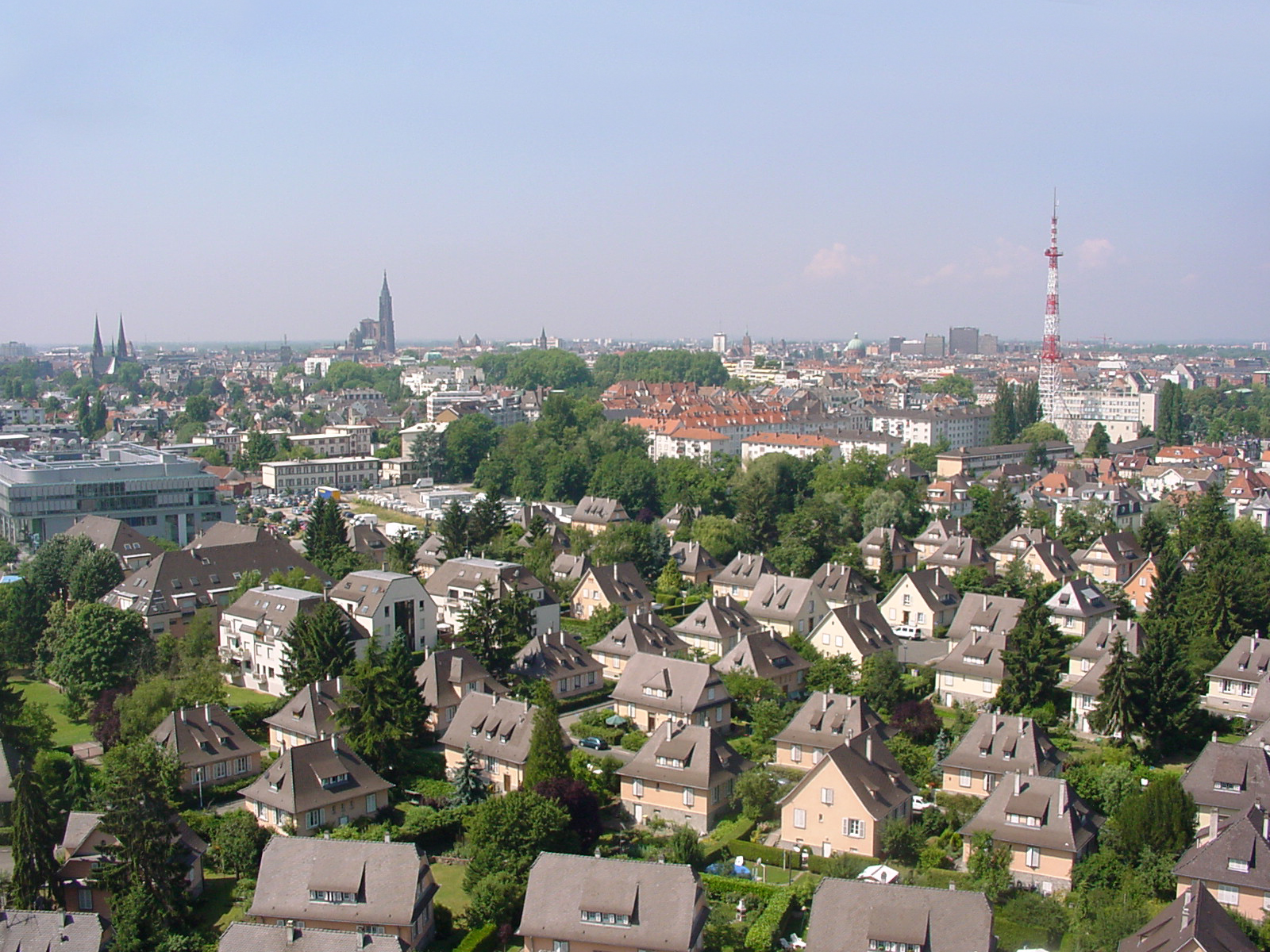 Vue de Strasbourg, depuis le batiment Louise Weiss du Parlement européen. Au premier plan, la cité Ungemach, cité ouvrière du début du XXe siècle. Au second plan de gauche à droite : le siège de la chaîne Arte, l'église St Paul, la cathédrale, la coupole de St Pierre le jeune, les bâtiment de le Place Des Halles, l'émetteur de France 3 Alsace.